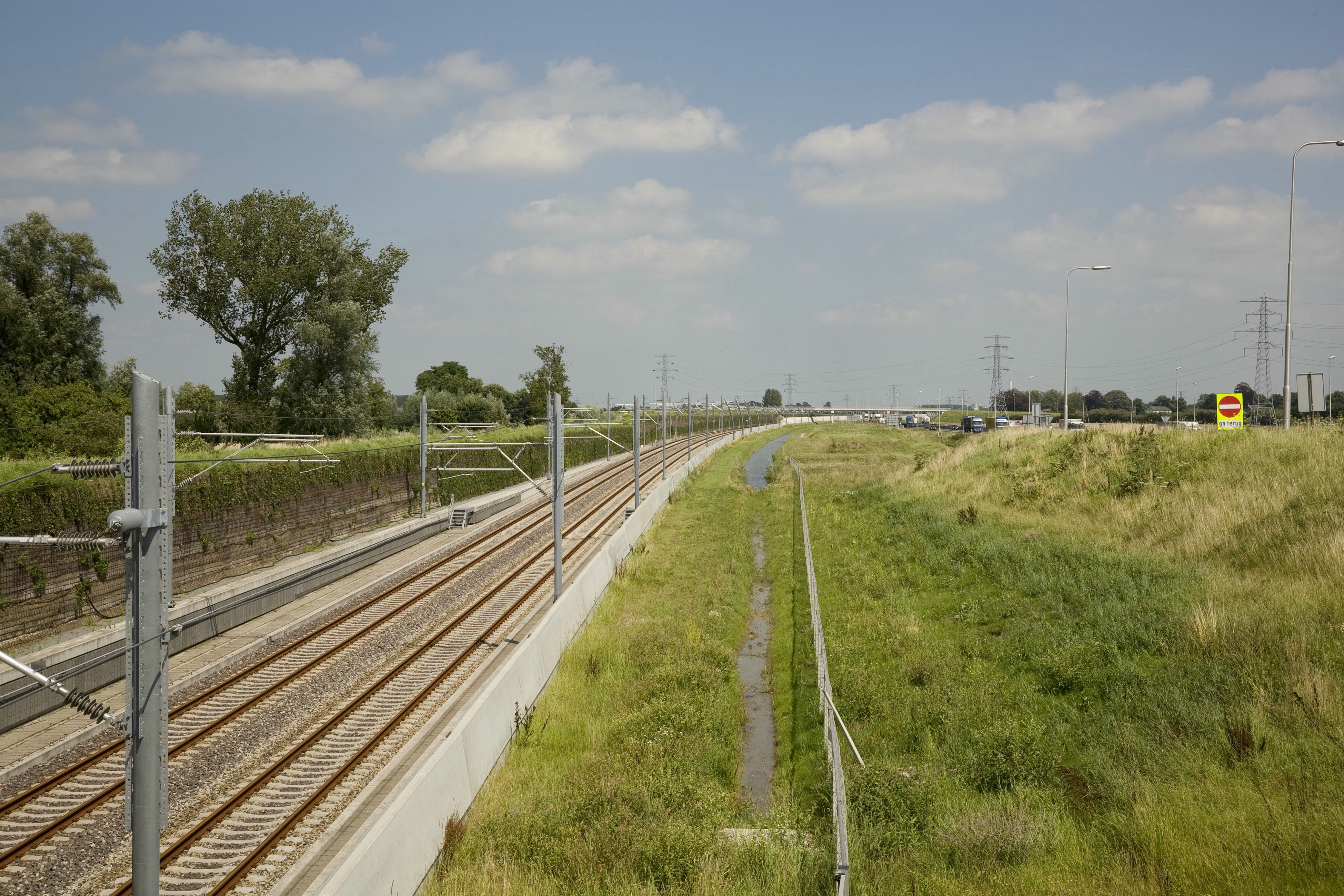 Betuweroute: Betuweroute in de Tielerwaard (opmerking: Betuweroute tussen knooppunt Deil en Dodewaard)